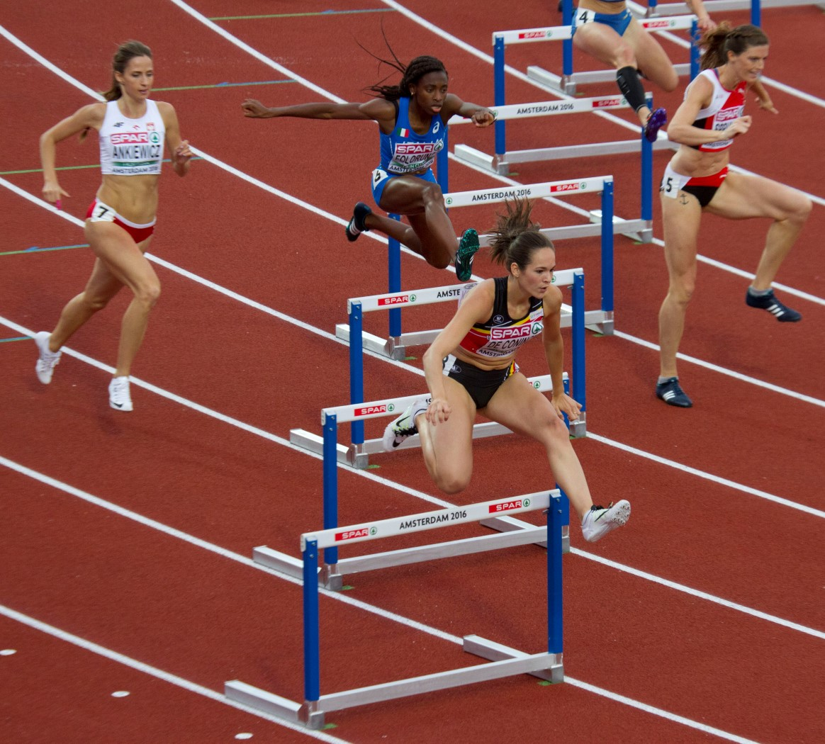 522 400mH nenah deconinck